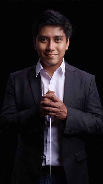 นรอรรถ จันทร์กล่ำ